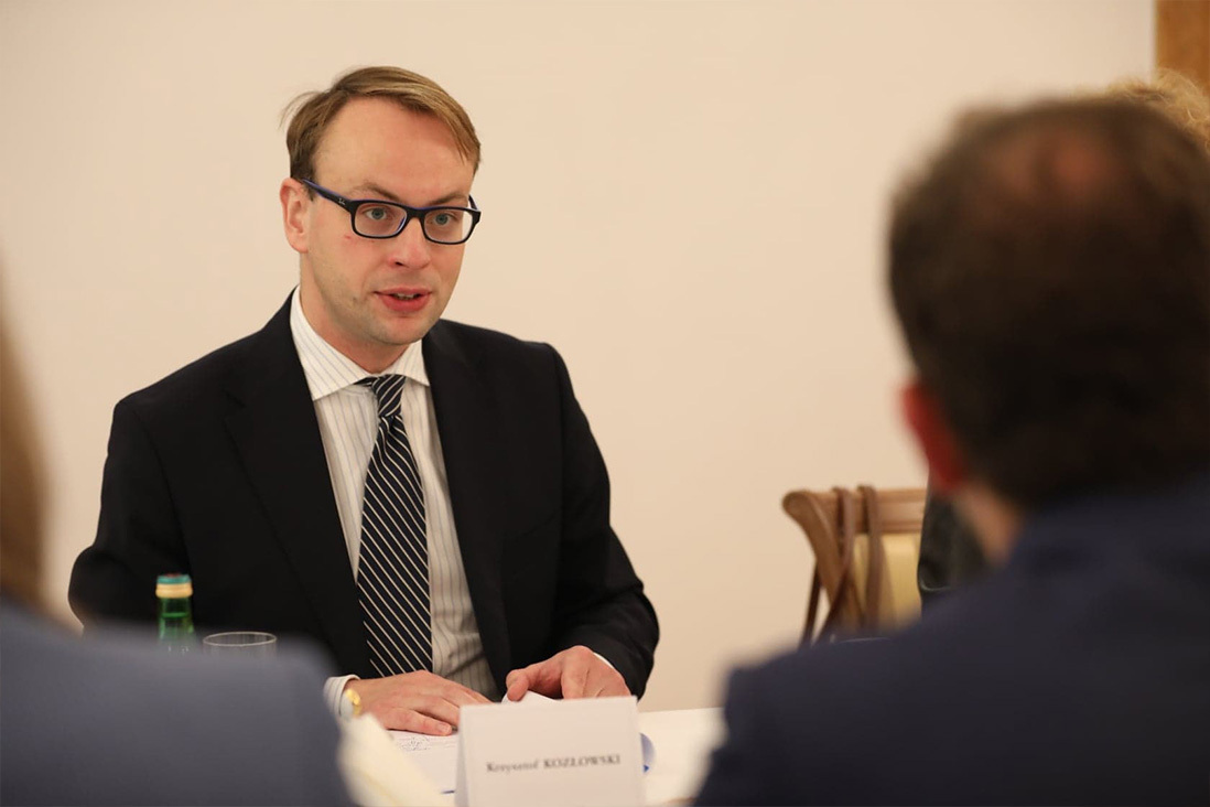 Krzysztof Kozłowski - wiceminister MSWiA